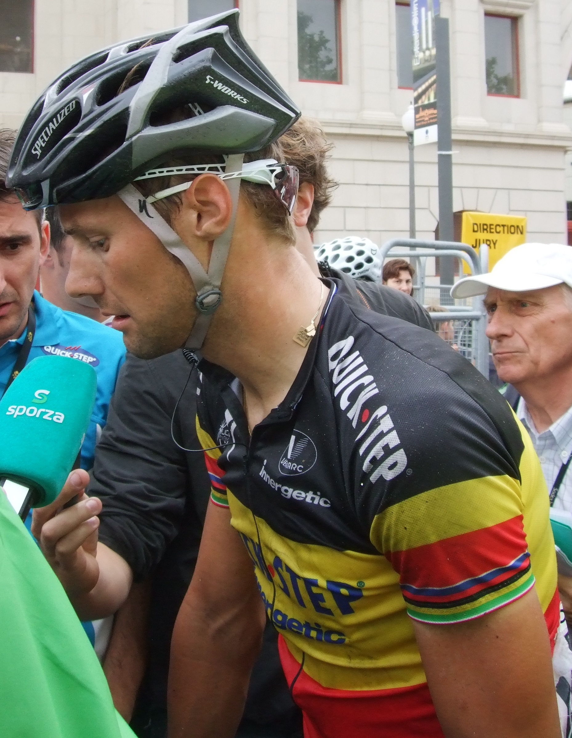 Tom Boonen intervjua under Tour de France 2009, ikledd belgisk meistertrøye.